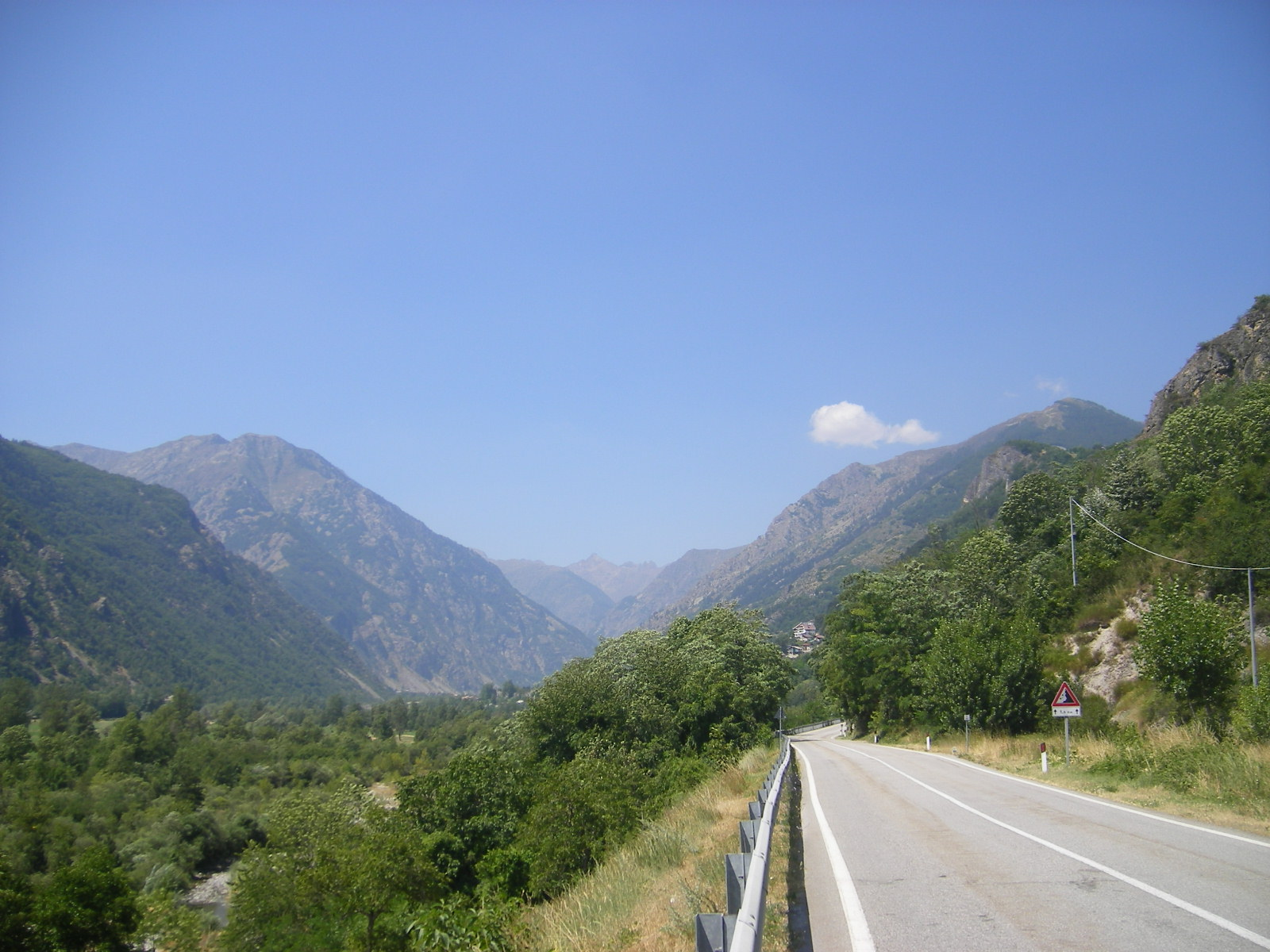 Landscape between Aisone and Vinádio